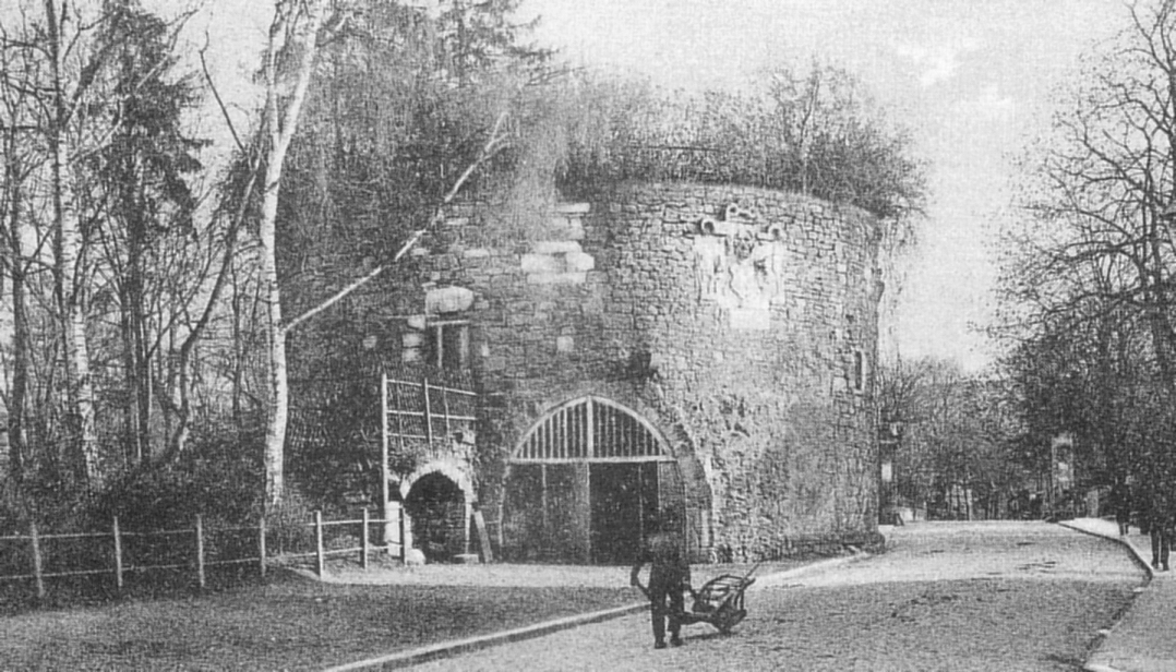 Rotunde in Münden, Blick stadtauswärts